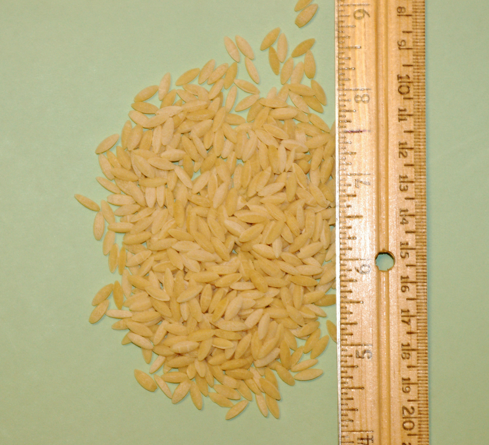 Orzo pasta with rule.